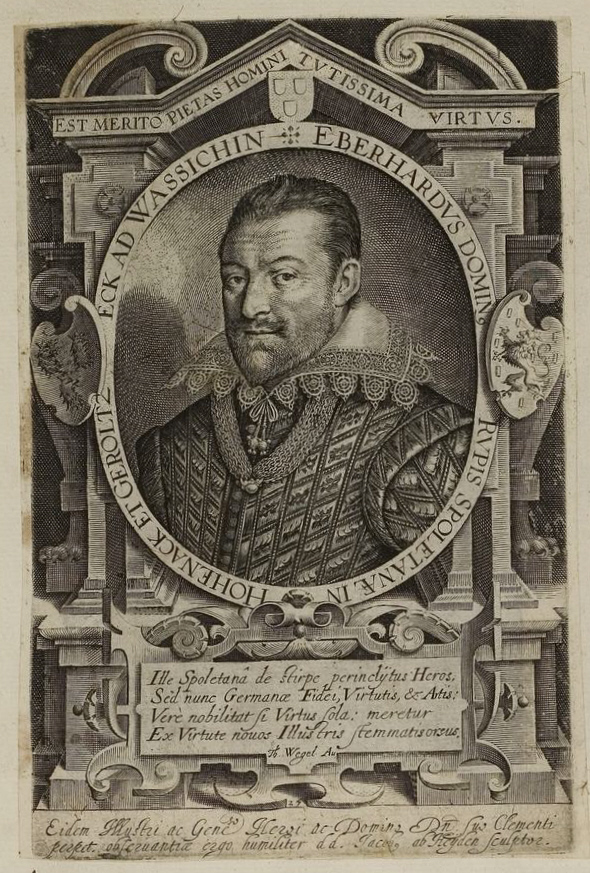 Grafik aus dem Klebeband Nr. 1 der Fürstlich Waldeckschen Hofbibliothek Arolsen Motiv: Eberhard zu Rappoltstein, Hohenack und Geroldseck am Wasichen, Kämmerer des 1619 gestorbenen Kaisers Matthias Authority control GND: 143935135